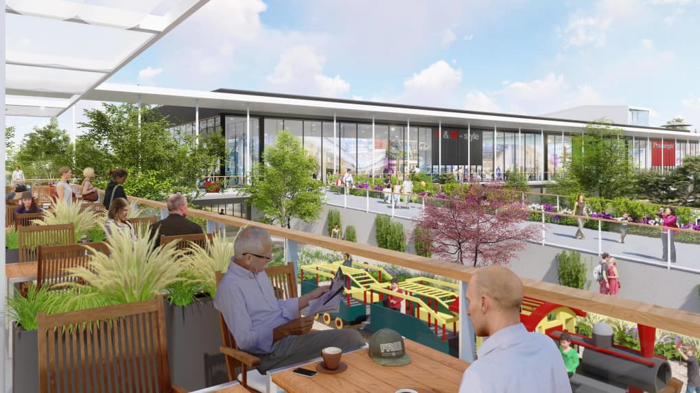 illustration des travaux